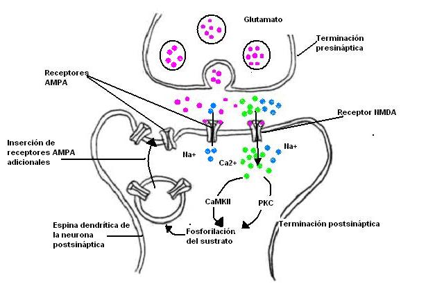 mecanismo de la potenciación una Largo Plazo En El hipocampo